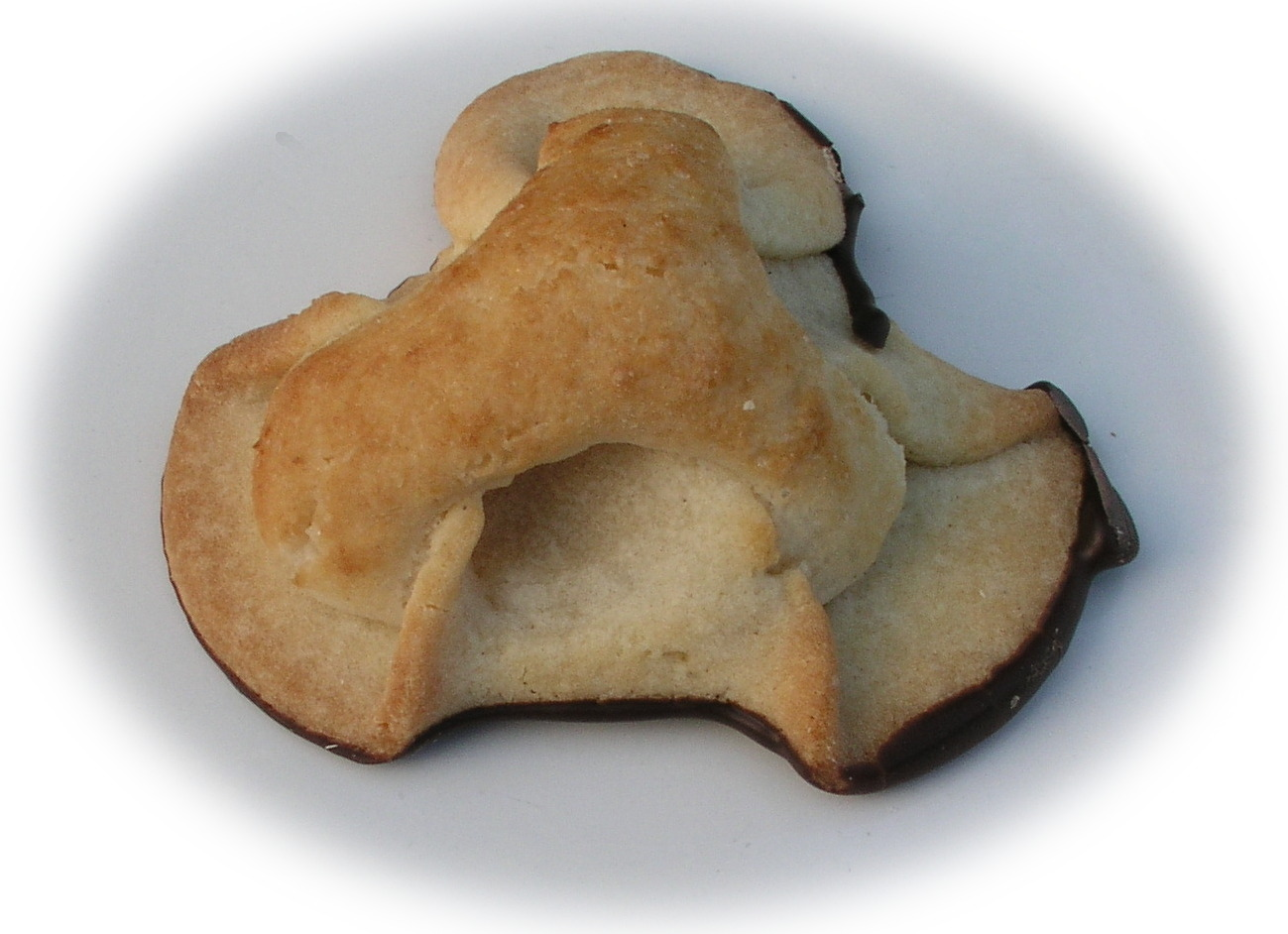 Napoleonshat